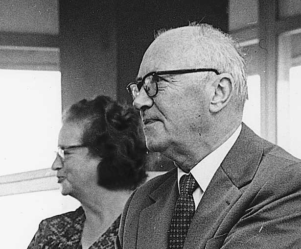 Foto op verzoek verstrekt door het Geografisch Instituut van de Universiteit Utrecht. Foto is vrij van rechten. Foto toont Prof. Dr. A.C. de Vooys met zijn vrouw bij zijn afscheid van de universiteit in 1974 Foto op verzoek verstrekt door het Geografisch Instituut van de Universiteit Utrecht. Foto is vrij van rechten.